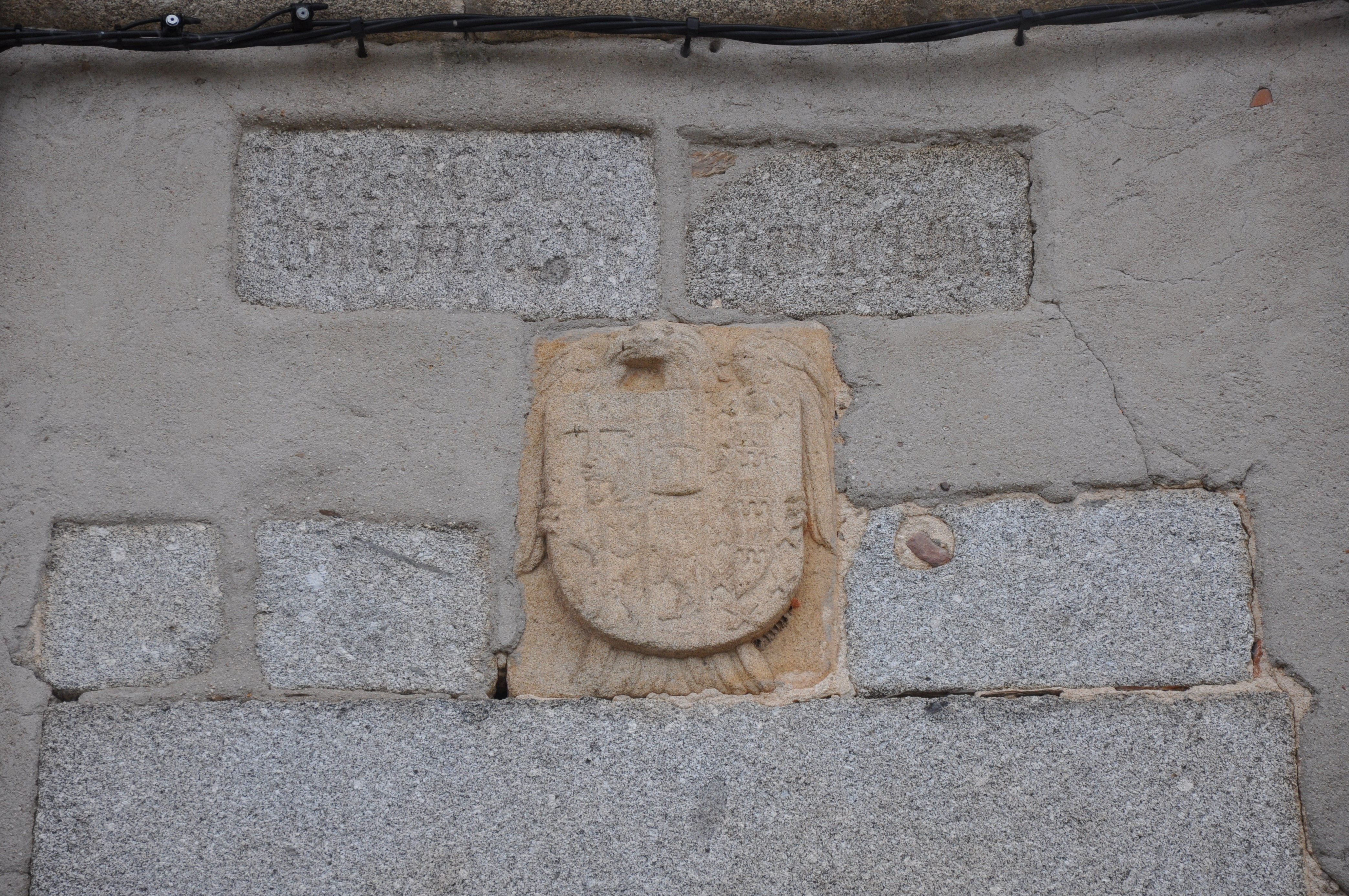 Escudo en una antigua casa palacio en San Martín de las Cabezas, Ávila, España